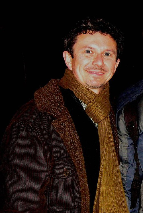 21 stycznia 1960 w Krakowie) - aktor, śpiewak, krakowski artysta